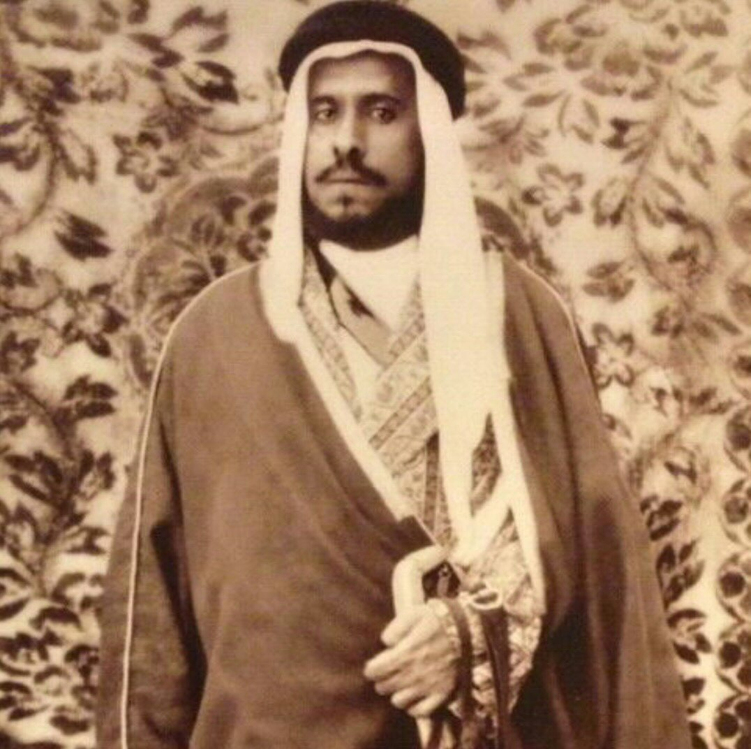 الامير تركي بن أحمد بن محمد بن أحمد السديري